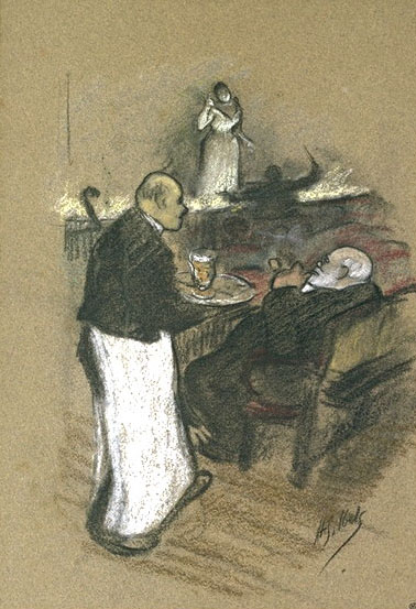 Portrait de Francisque Sarcey assis sur un des fauteuils d'un café-concert